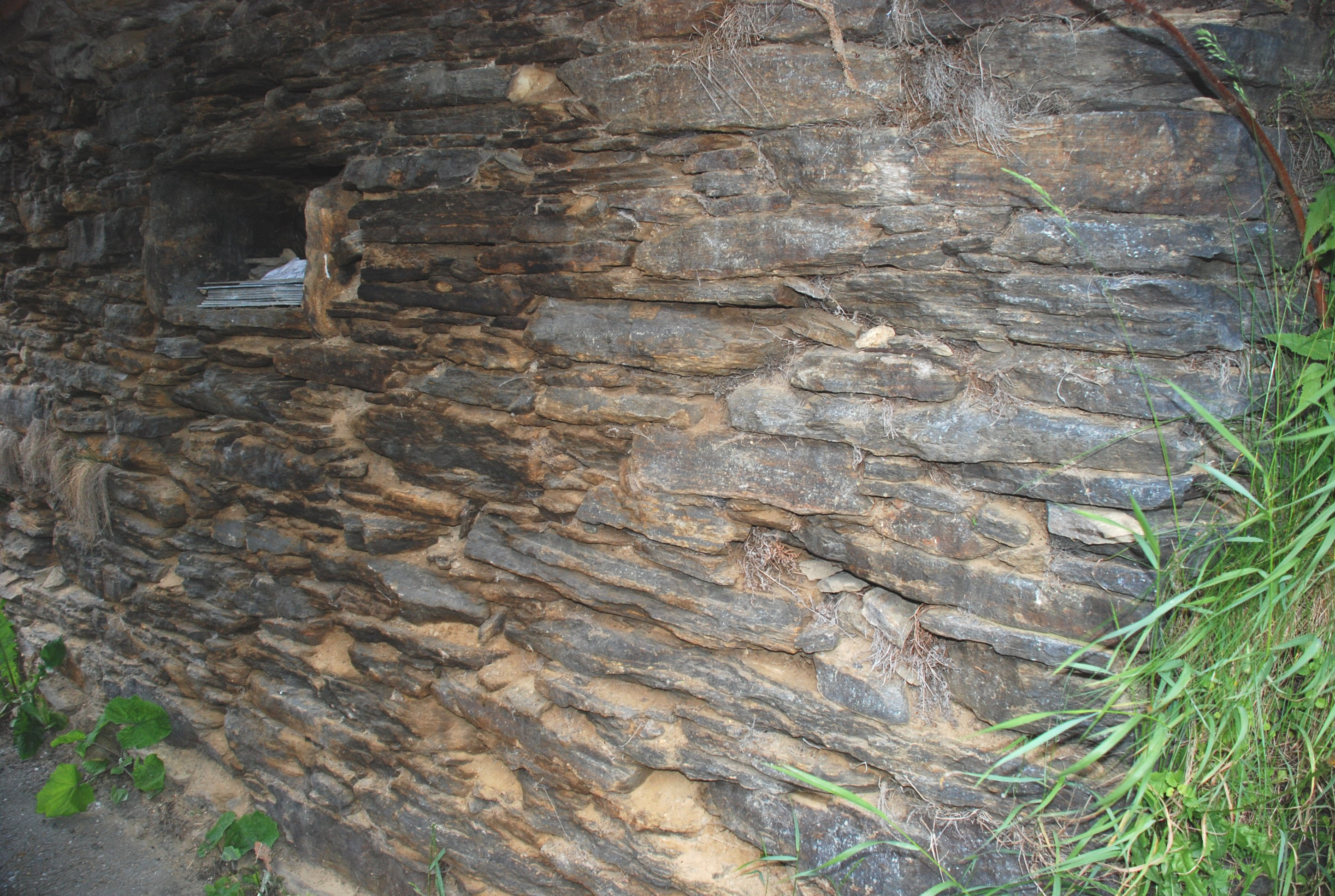 Mauer aus Gneisplatten